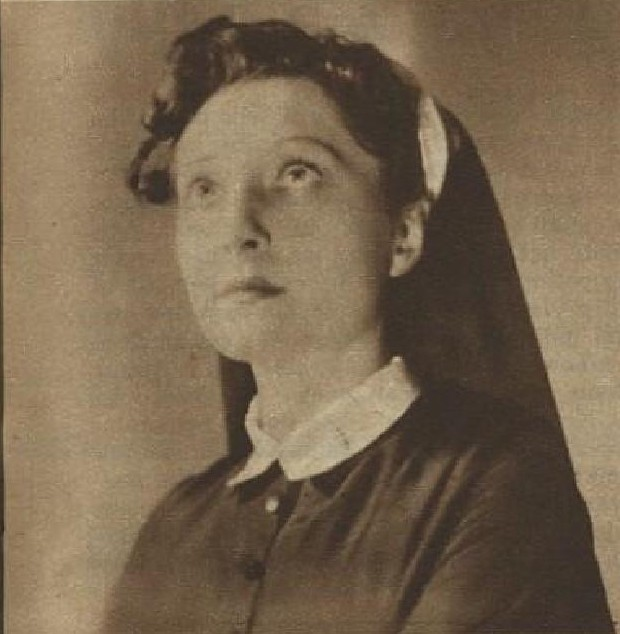 Eliška Poznerová (1906-1991), česká herečka